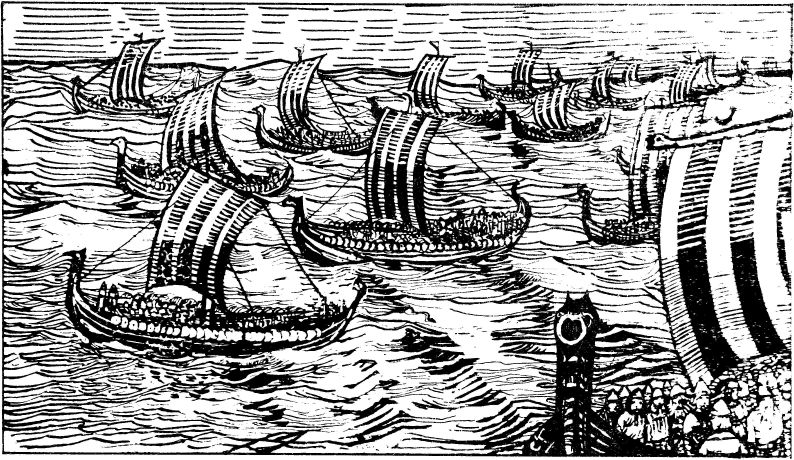 Christian Krohg: Illustration for Olav den helliges saga, Heimskringla 1899-edition. nn: «Kong Olav seglar i brureferd til landmerket.»